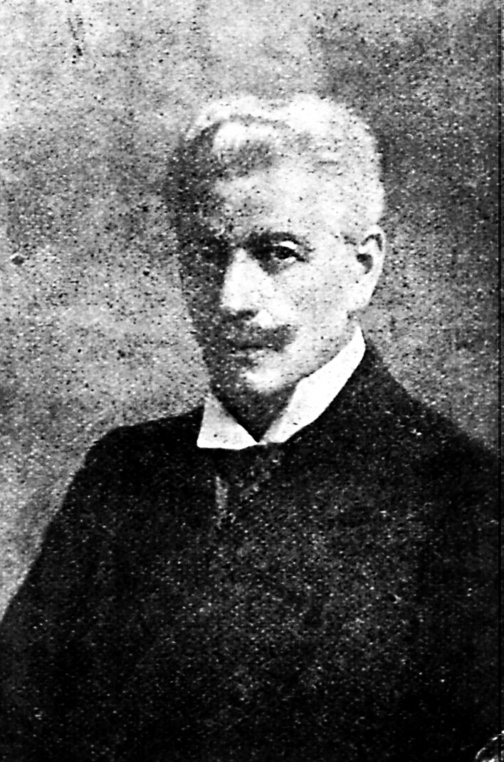 Professor Otto Anthes feiert am 7. Oktober seinen 50. Geburtstag